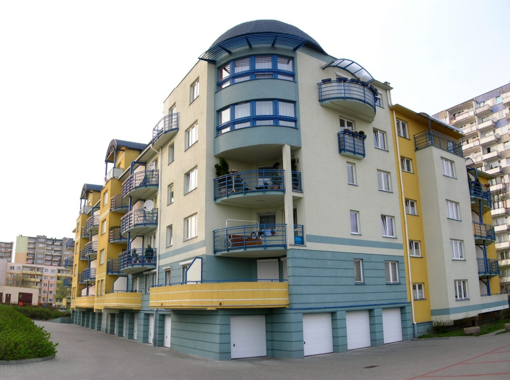 Budynek Bydgoskiej Spółdzielni Mieszkaniowej przy ul. Ujejskiego w Bydgoszczy